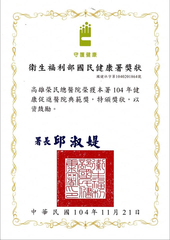 中華民國衛生福利部國民健康署頒給高雄榮民總醫院的中華民國104年健康促進醫院典範獎獎狀。